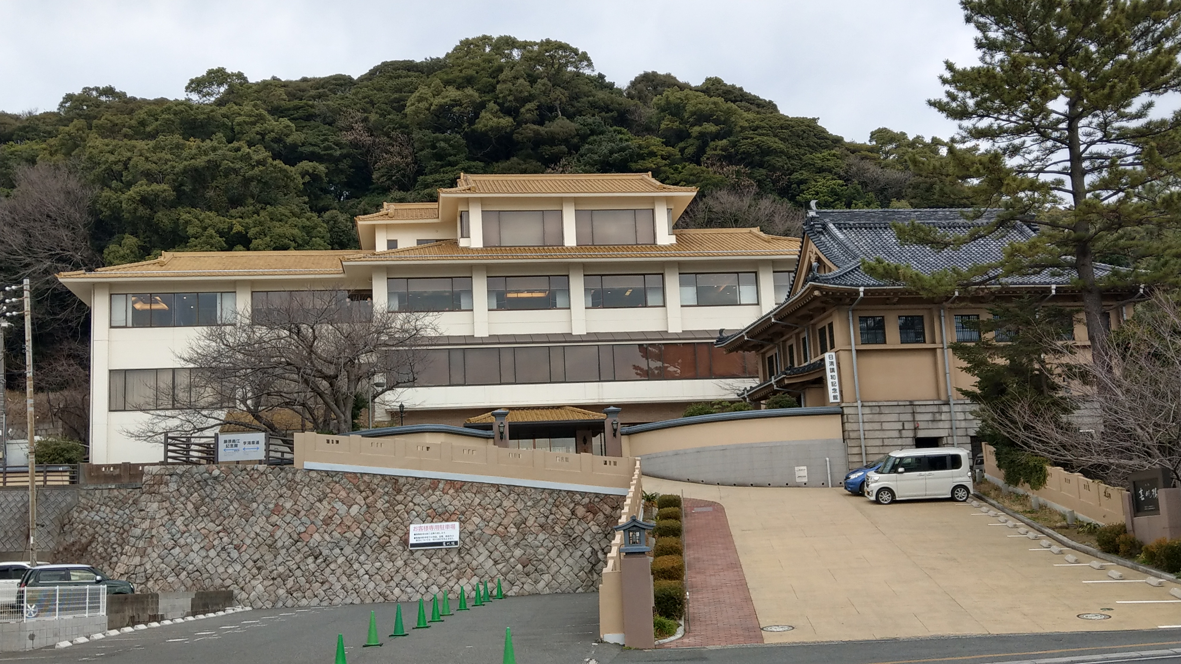 位於日本山口縣下關市的春帆樓，右側為較小建築物為日清議和紀念館。